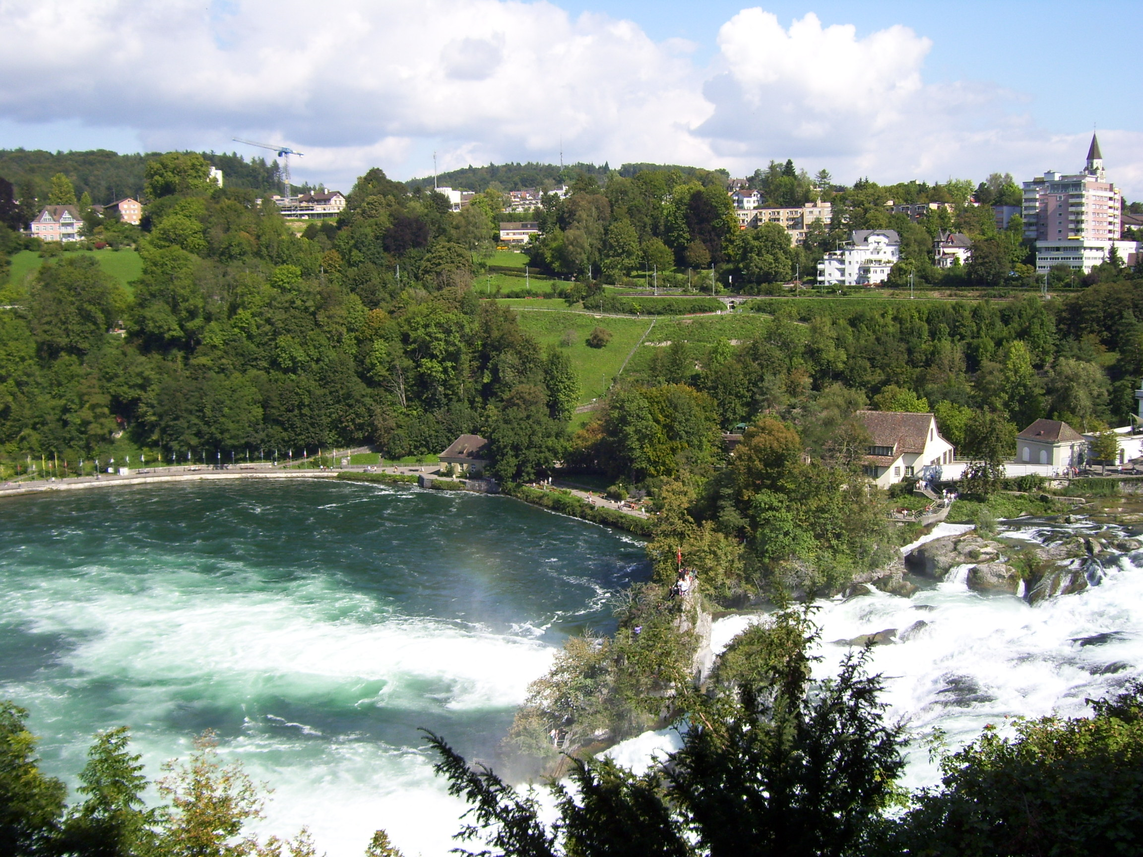 Der Rheinfall zwischen Laufen und Neuhausen in der Schweiz